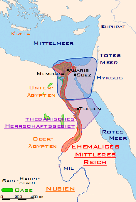 Ausdehnung des altes ägytischen Reiches (Zweite Zwischenzeit) Karte wurde selbst erstellt